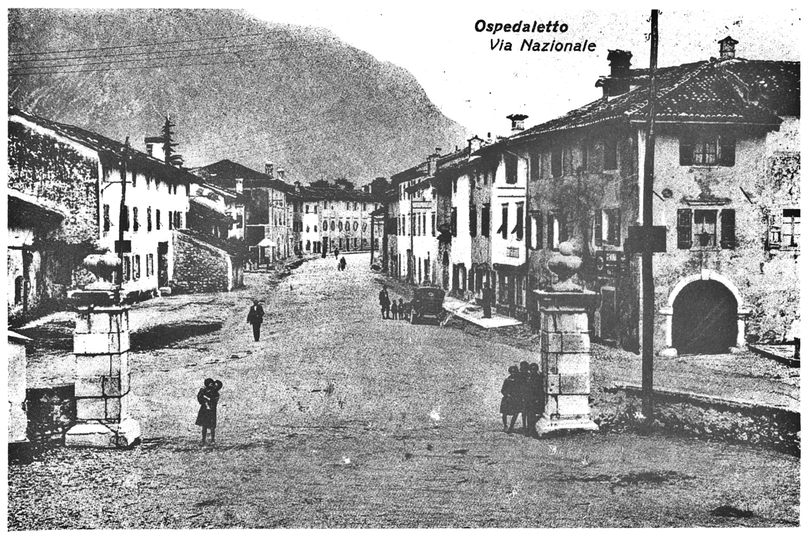 Ospedaletto di Gemona del Friuli cartolina postale 1928